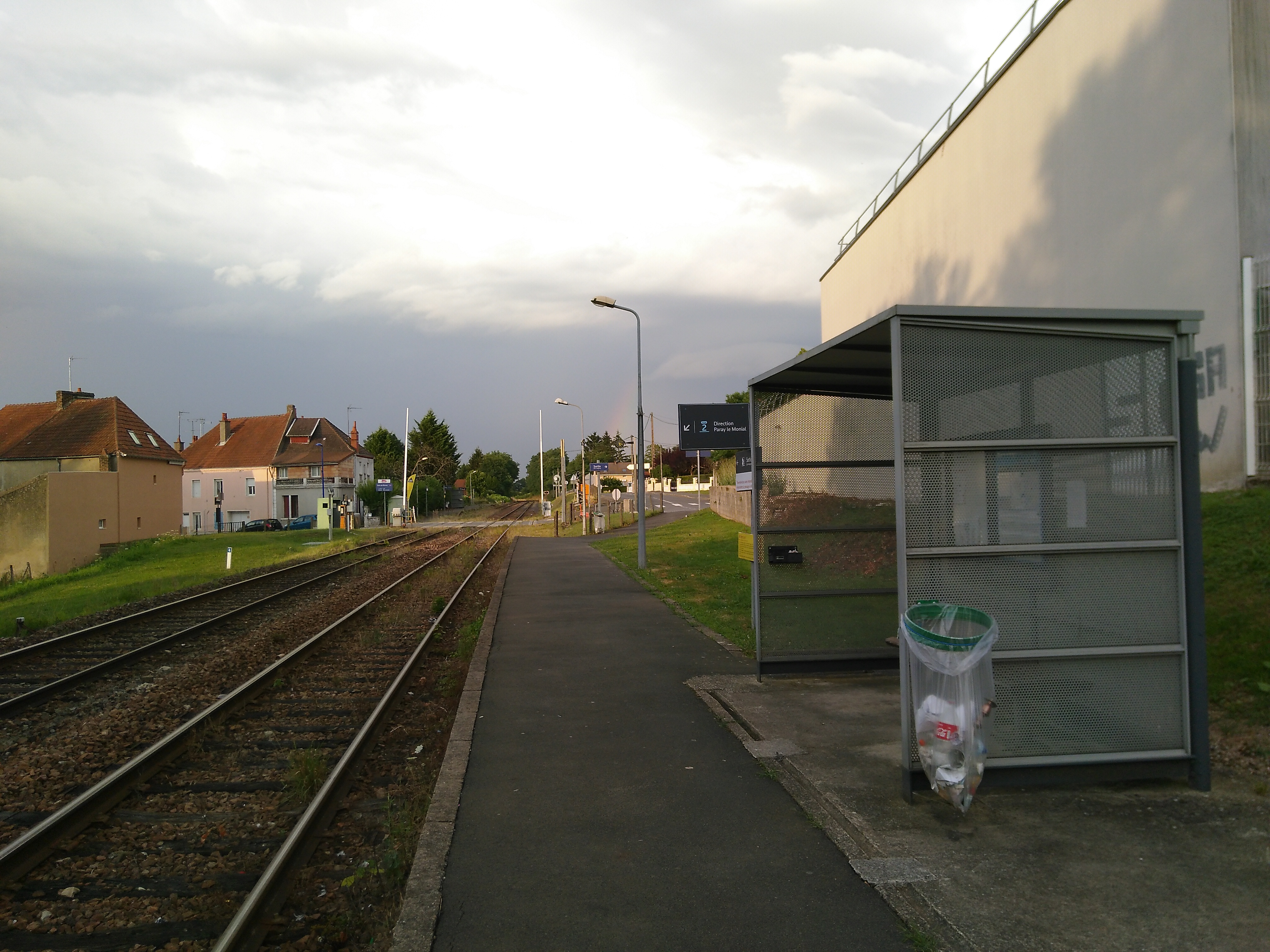 Halte ferroviaire de Blanzy